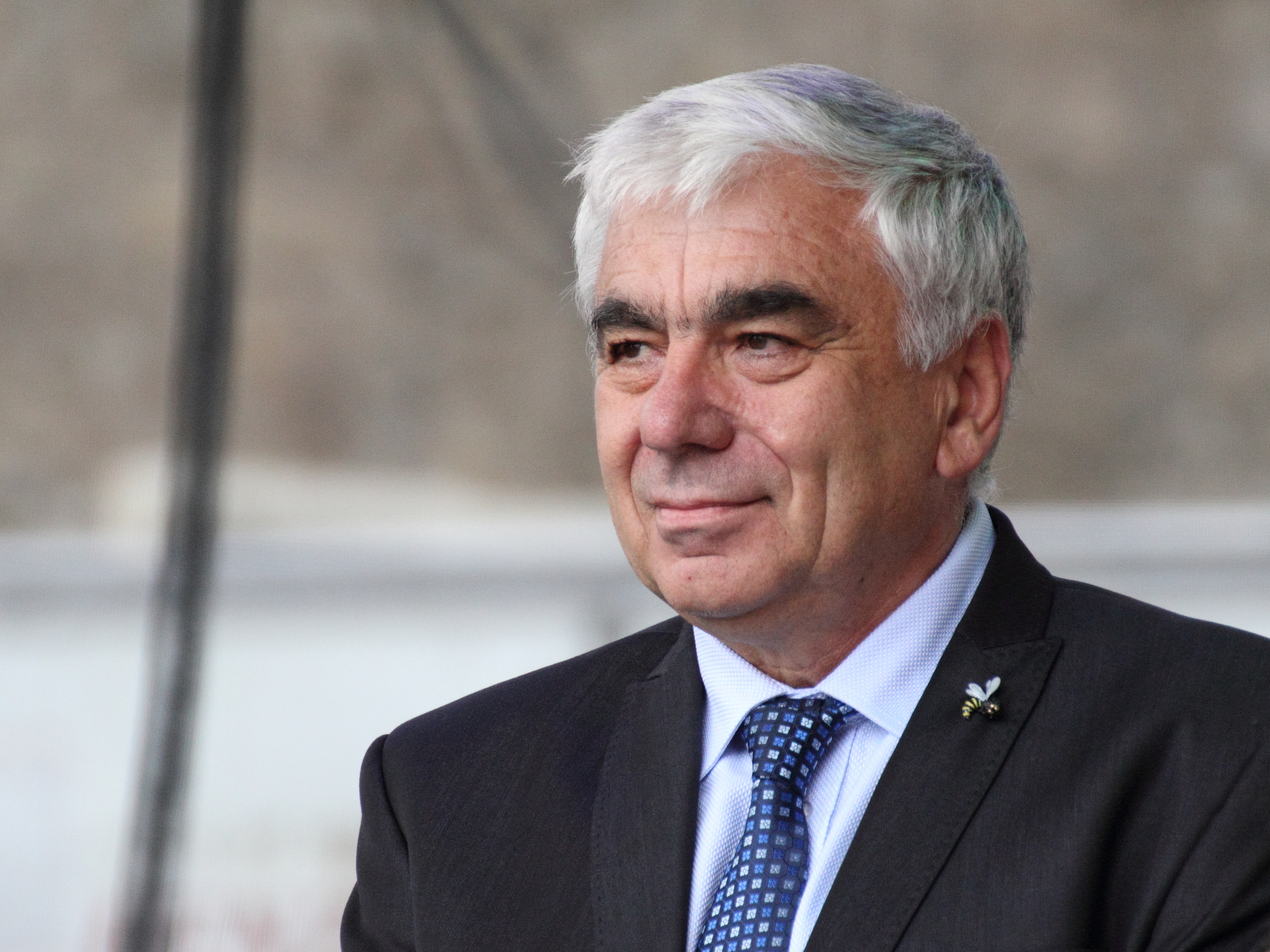 Senátor Jiří Vosecký na 15. krajských dožínkách Libereckého kraje (Radimovice/Sychrov)